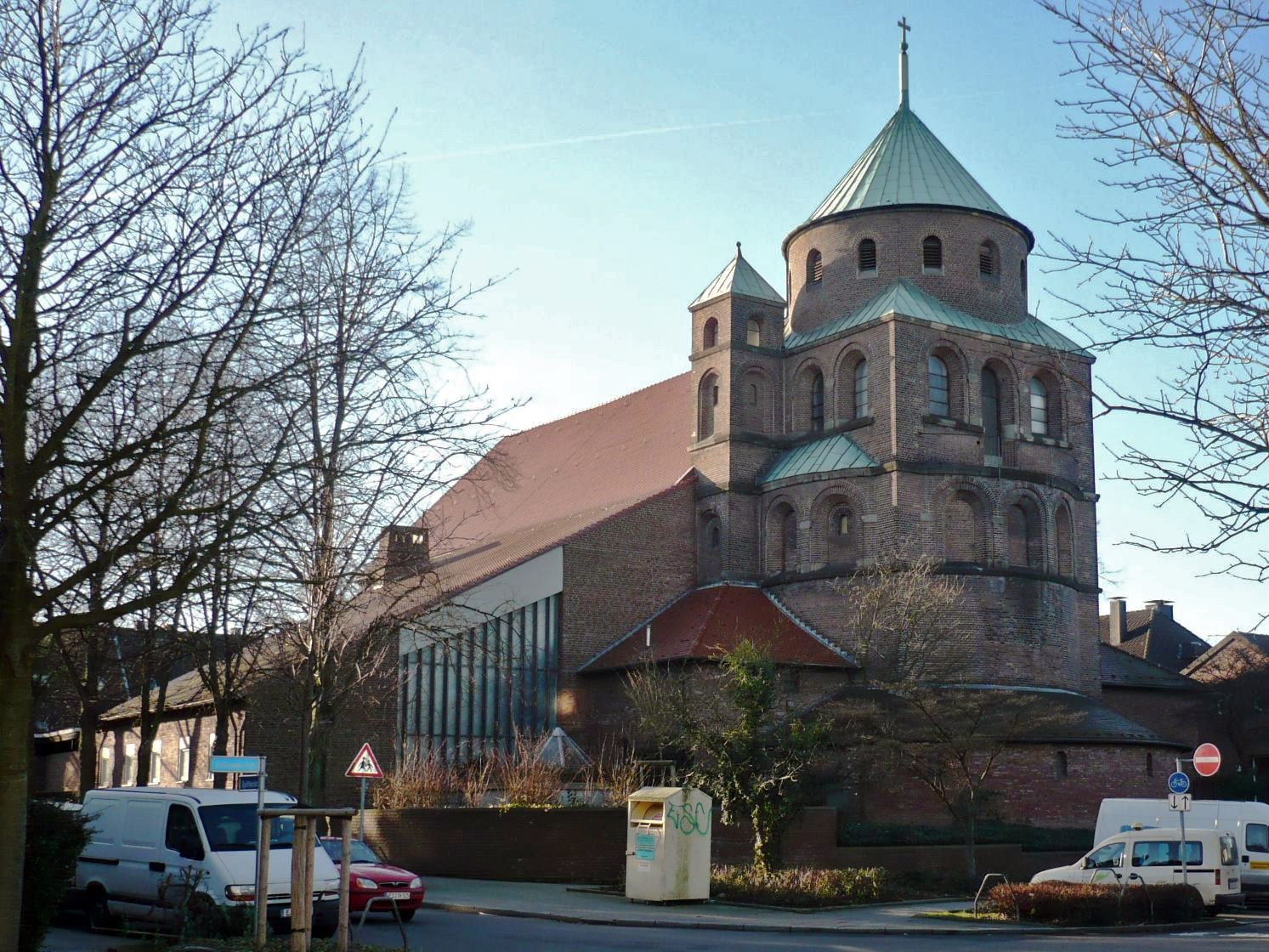 Kirch St. Elisabeth Essen-Frohnhausen